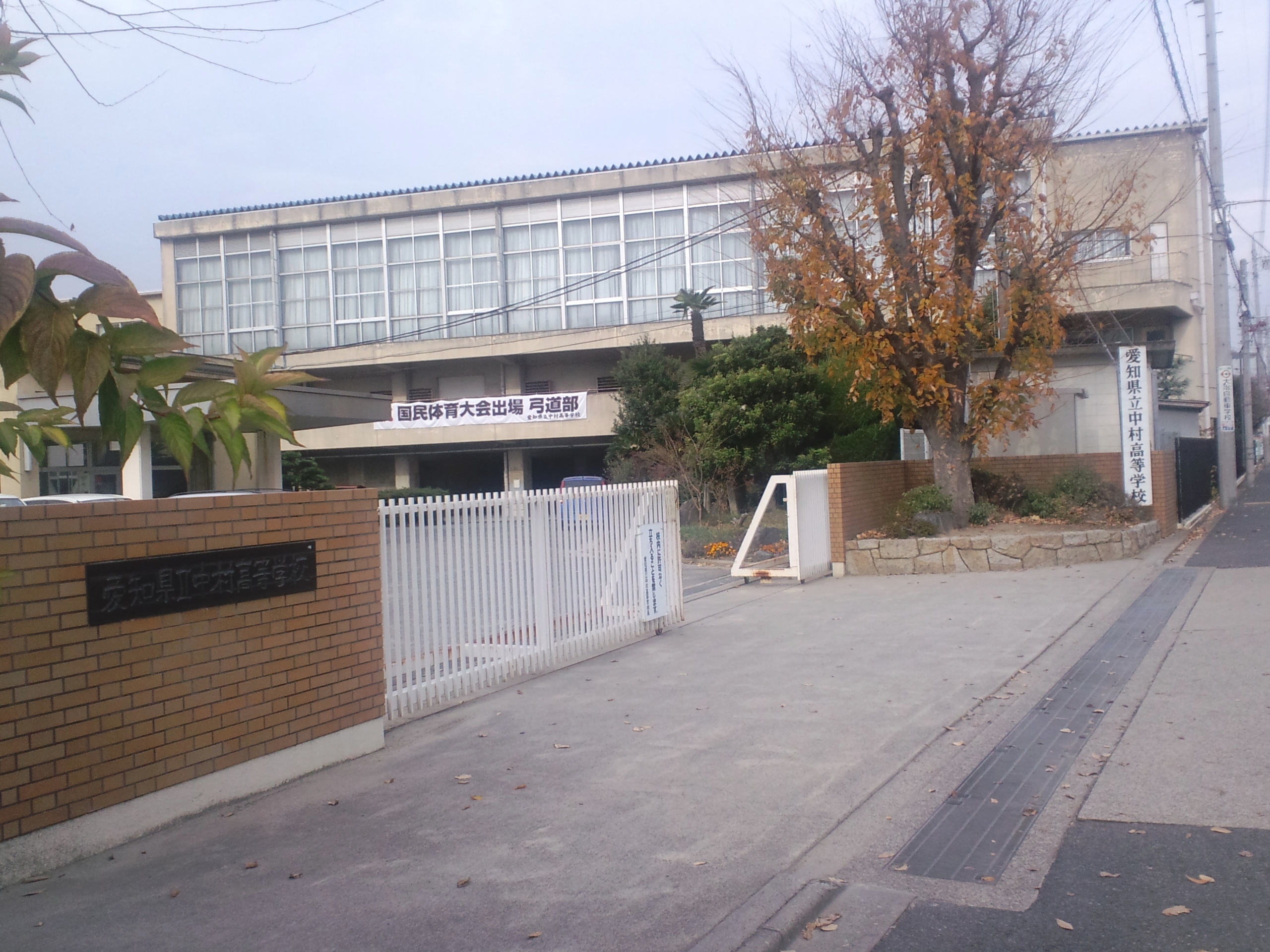 愛知県立中村高等学校